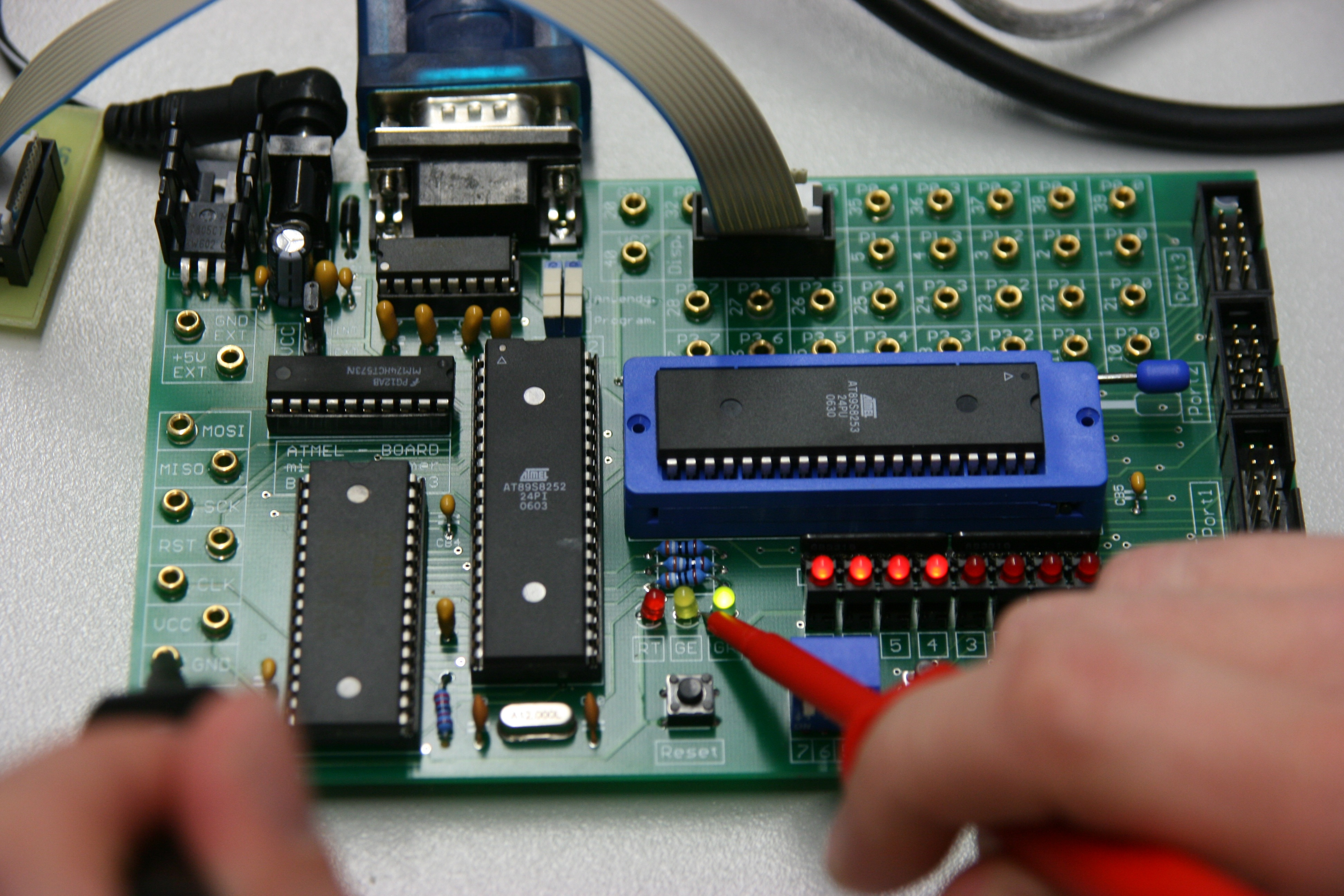 Análise de circuitos